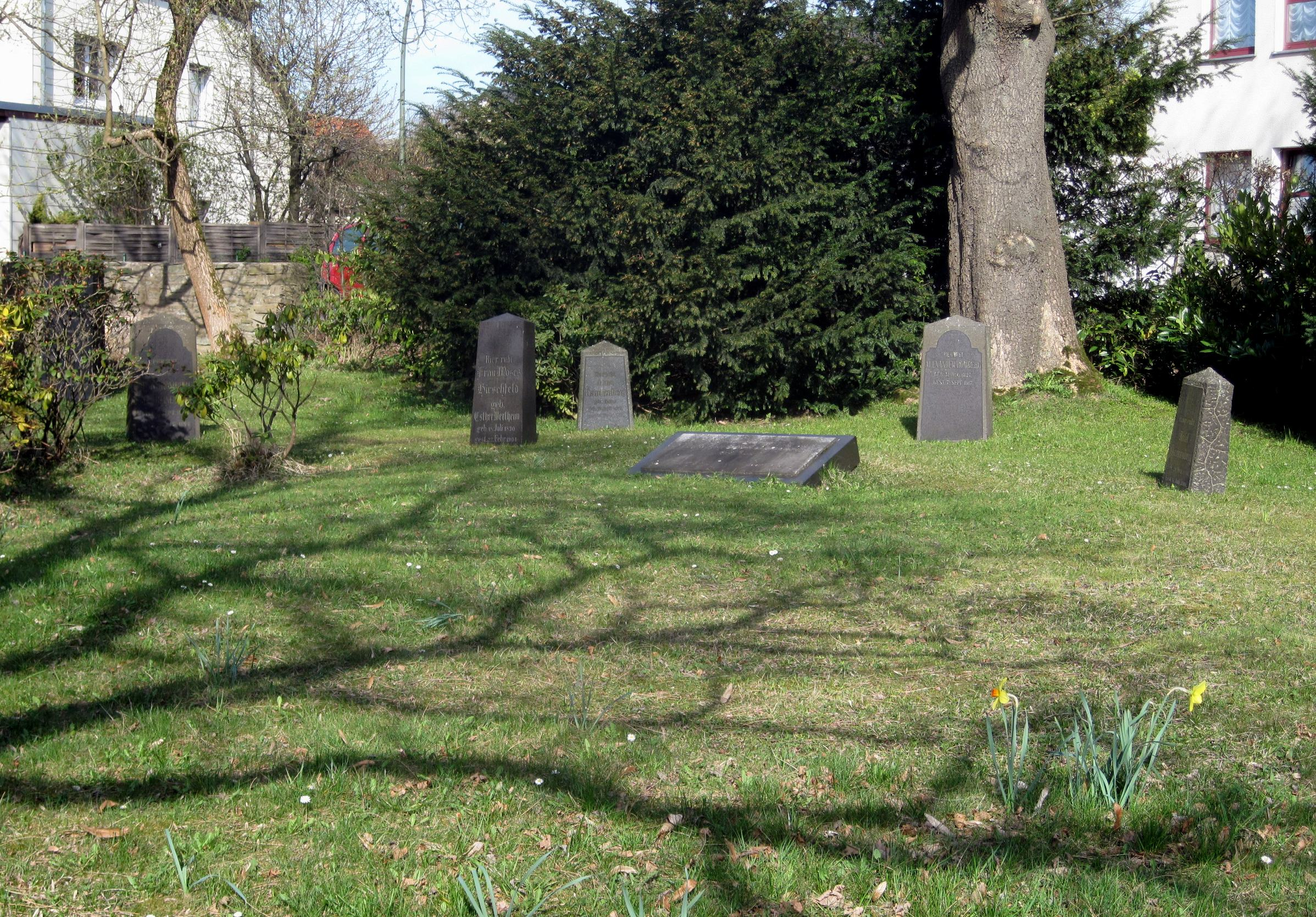 Jüdischer Friedhof, Dördelweg in Iserlohn. Denkmal seit 10. Februar 2005.